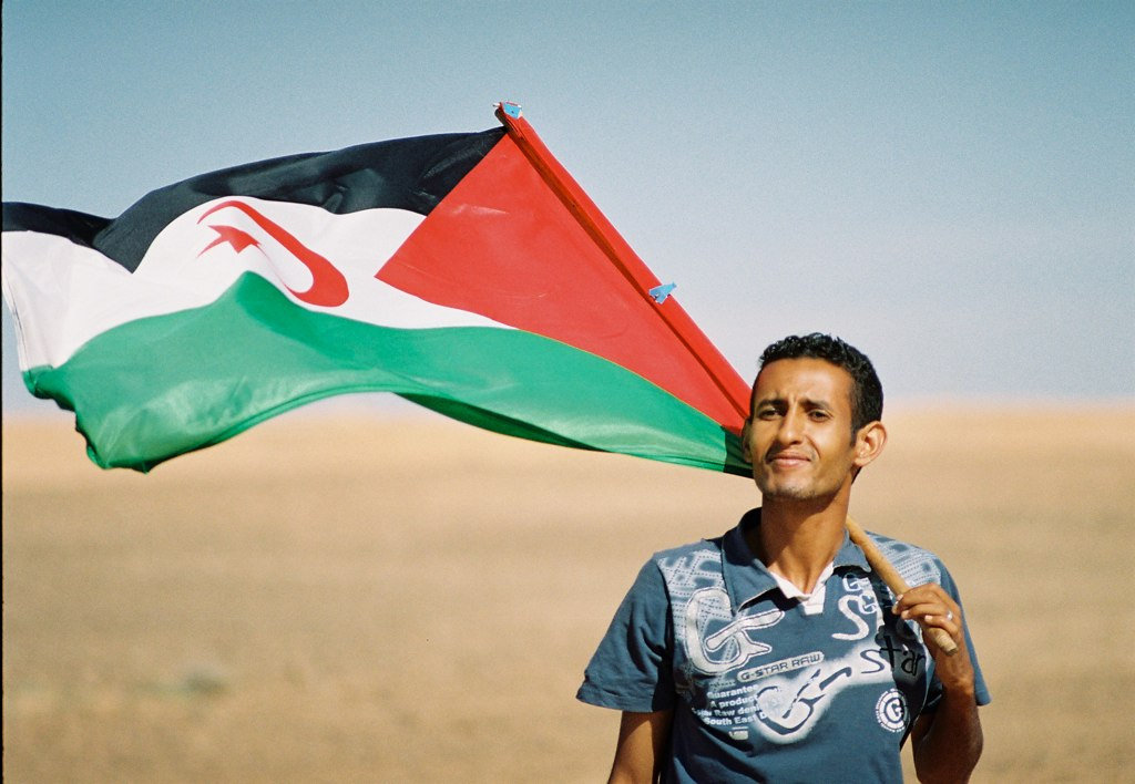 Hamdi.